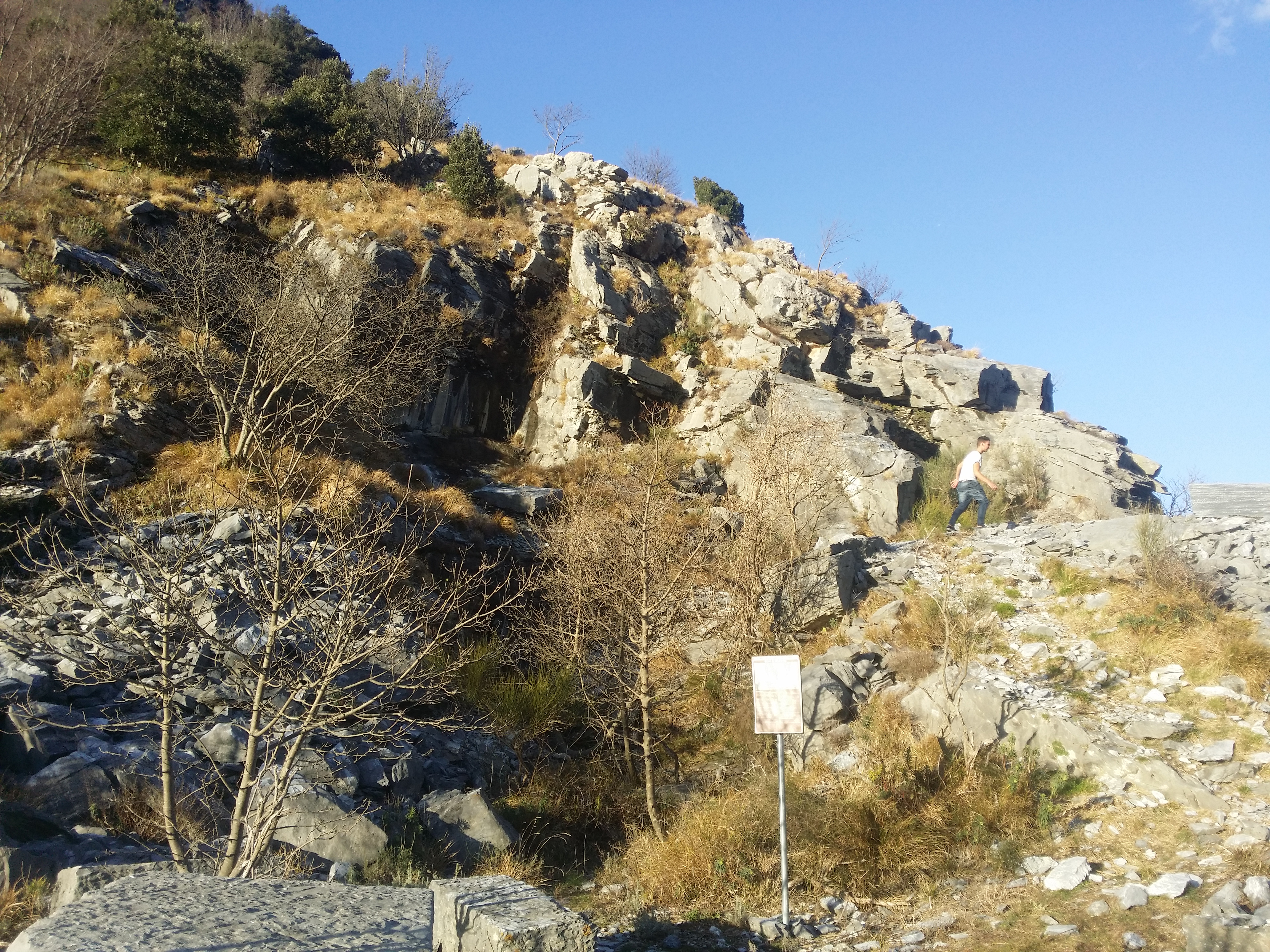 Sito estrattivo del bardiglio fiorito in località Retignano.